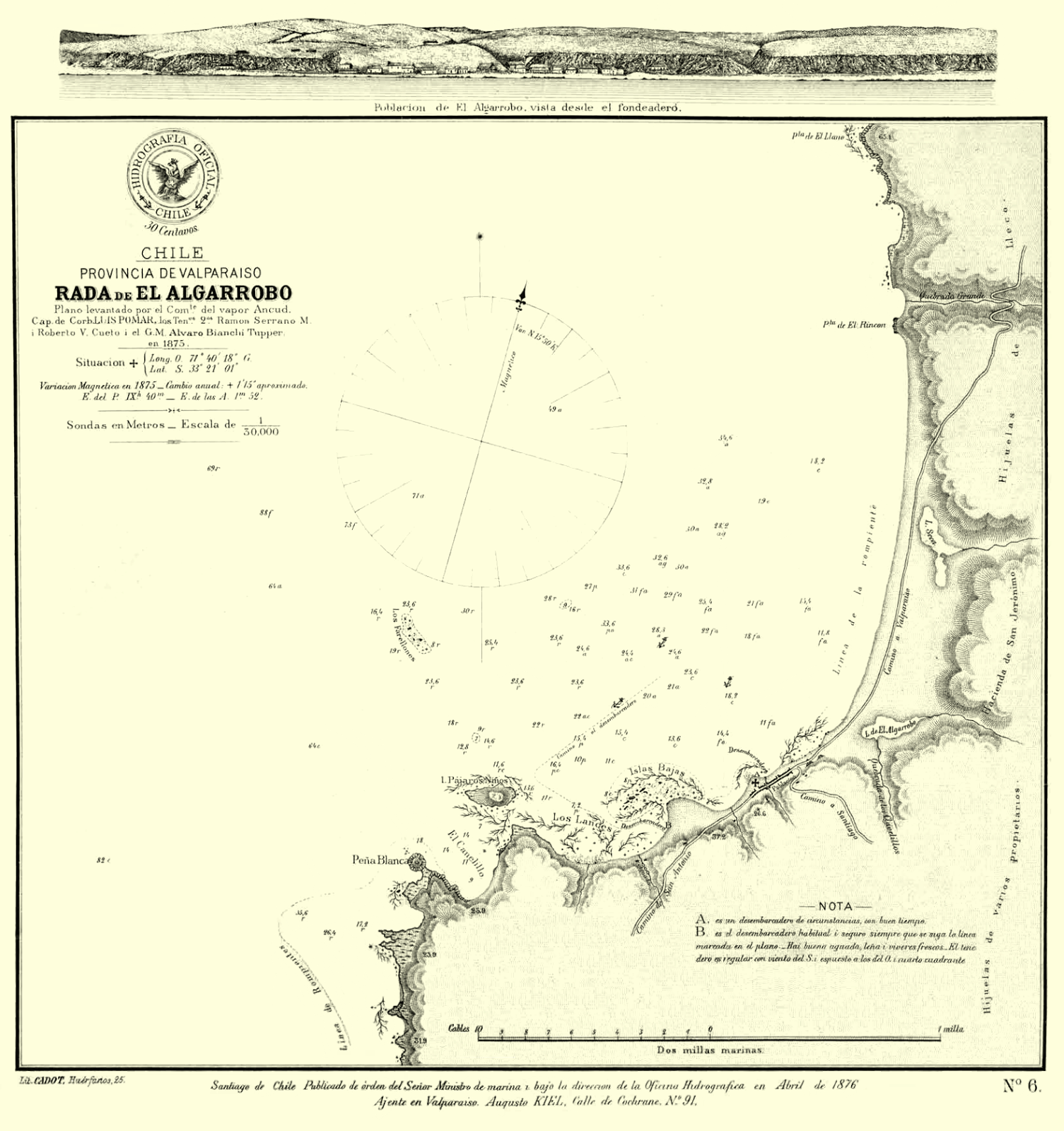 Planos de puertos publicados por el Servicio Hidrográfico de la Armada de Chile.